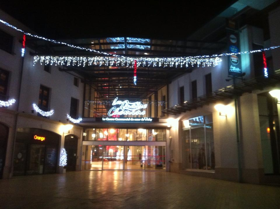 le façade du centre commercial Les Quatre Chemins au centre ville de Vichy en Hiver 2013.